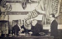 Presidente Eduardo Santos, frente al Mural por el Maestro Santiago Martinez Delgado.